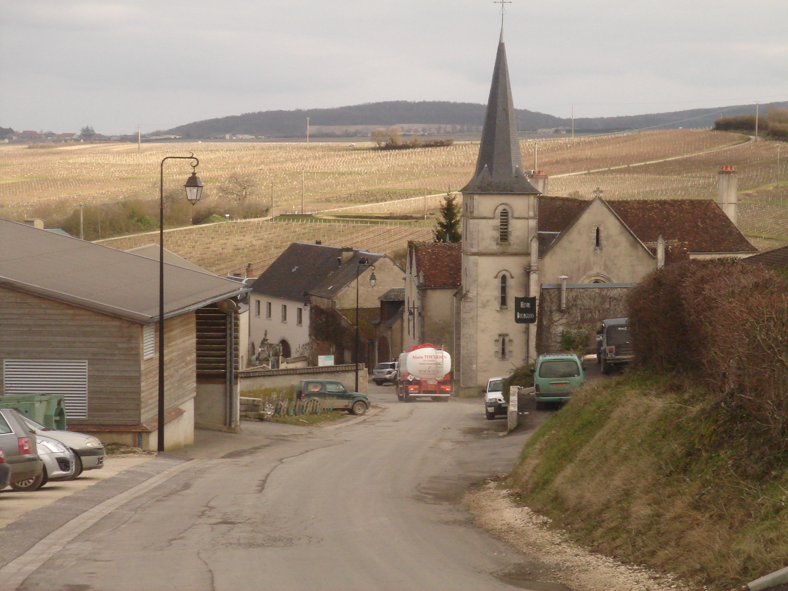 La vilaĝo Chavignol [ŝavinjol'] situas en centra Francio.